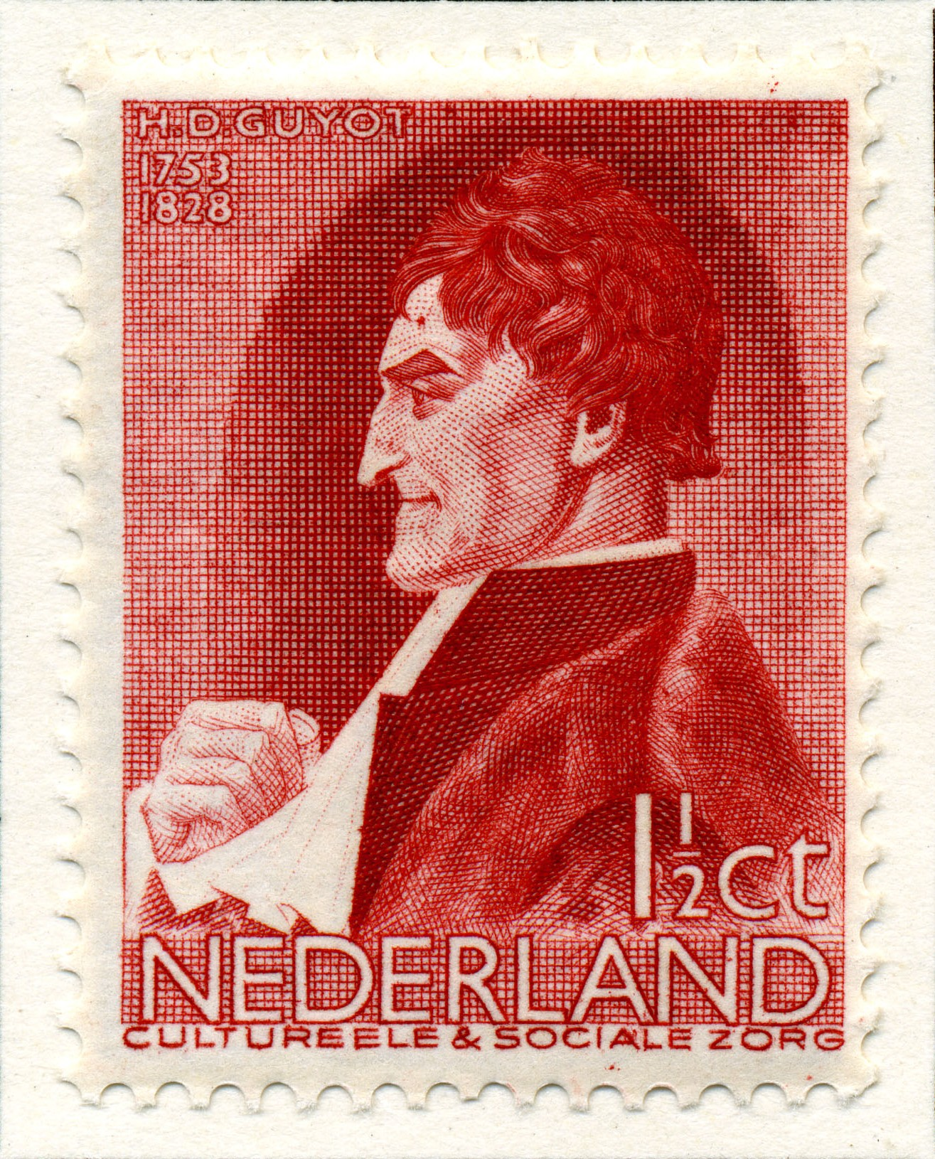 Zomerzegel (1935) met afbeelding van H.D. Guyot (1753-1828) dovenonderwijs